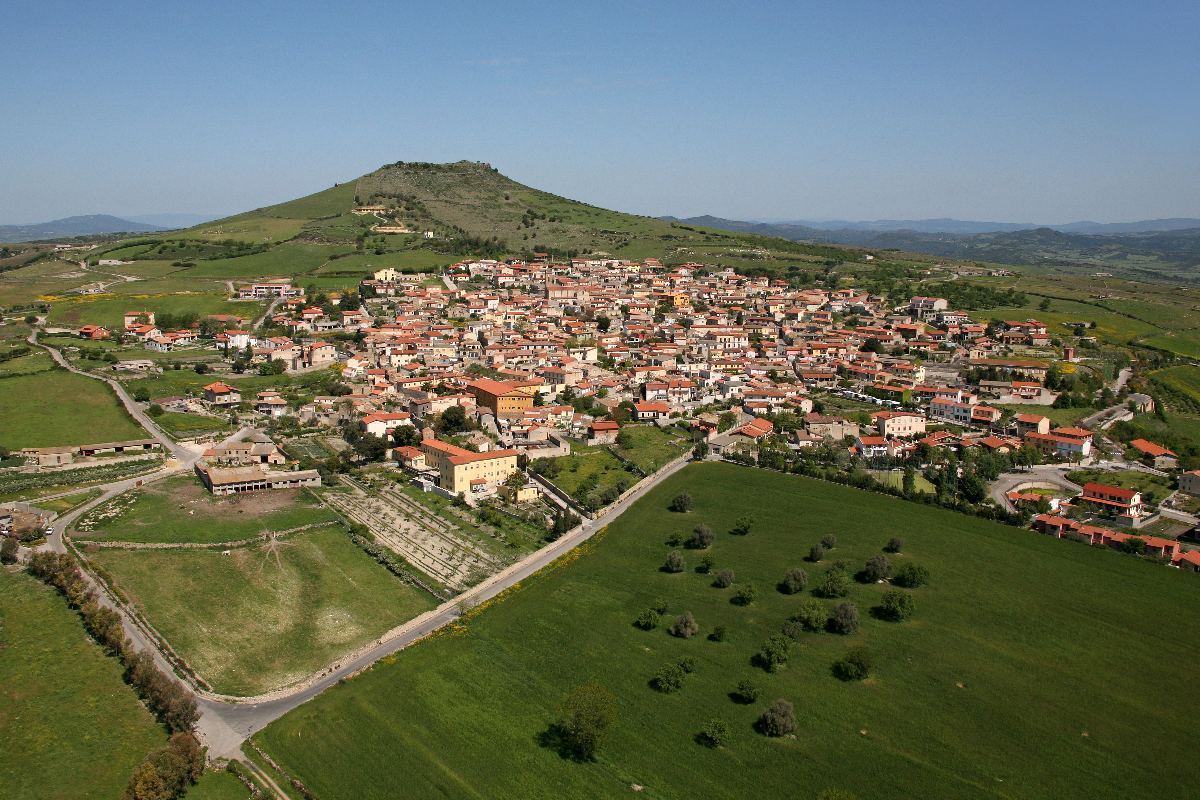 vista dall'alto